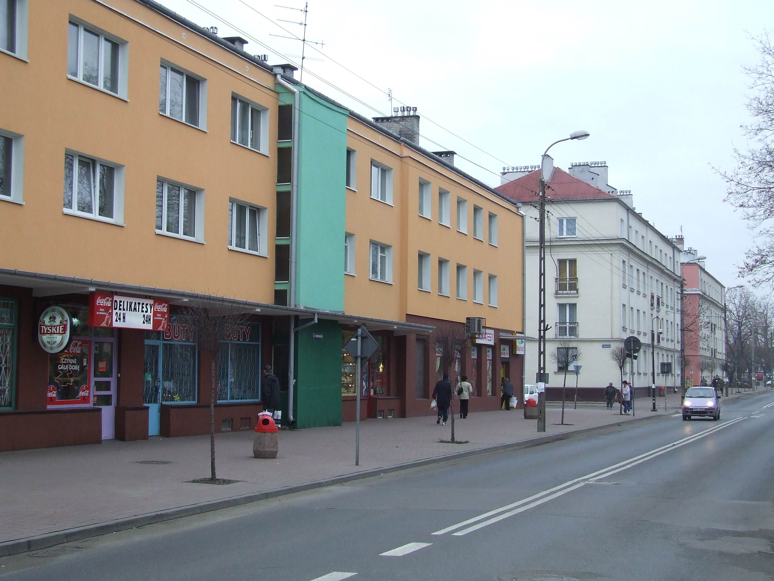 Nowy Dwór Mazowiecki, ul. Warszawska, droga krajowa nr 631